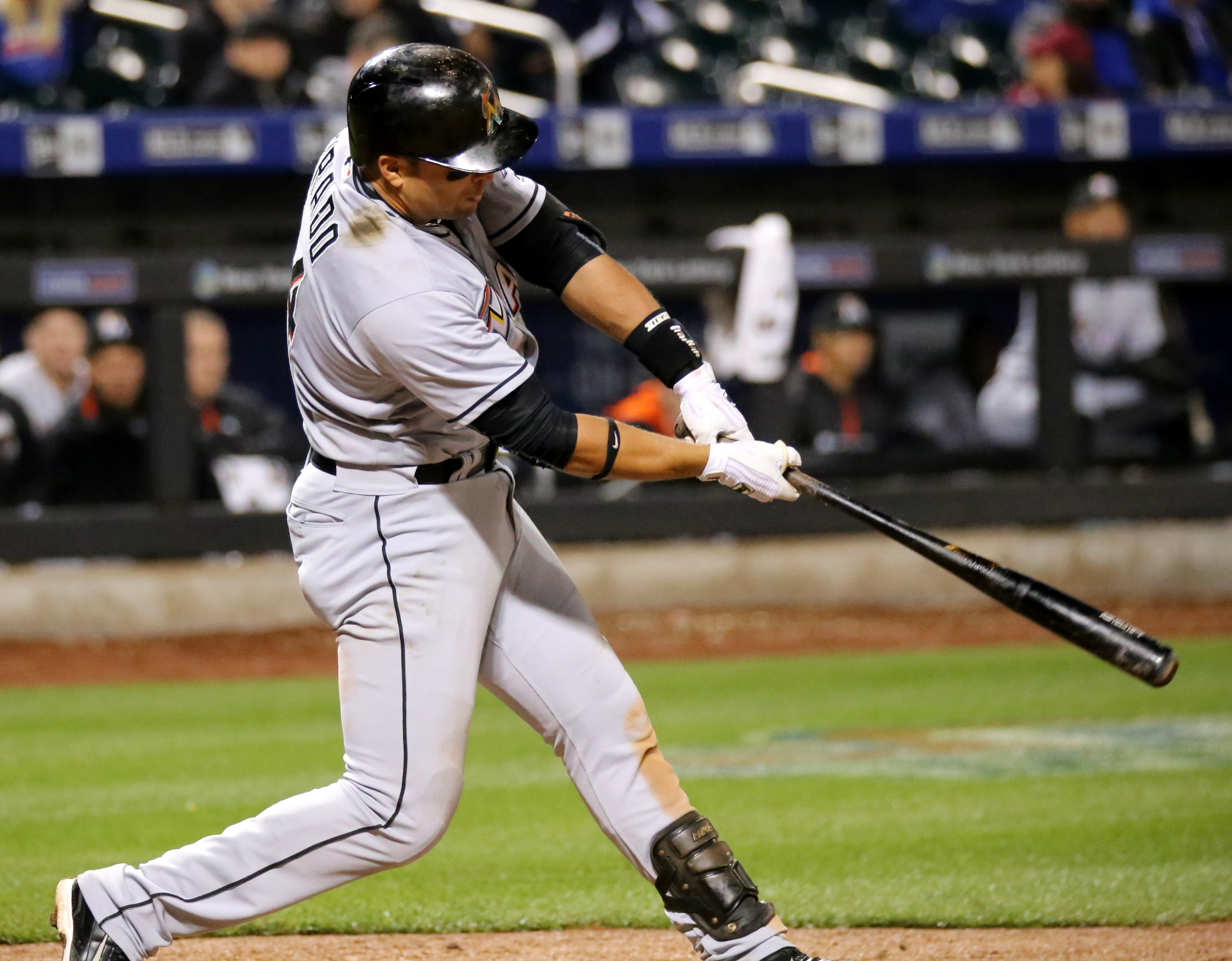 Martín Prado